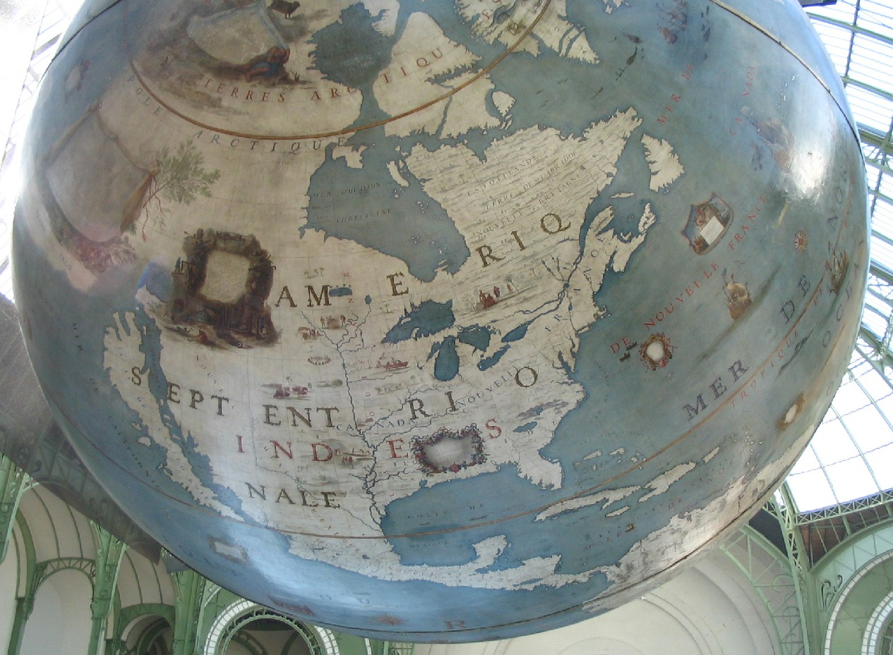 Photographie des Globes de Coronelli prise au Grand Palais le 22 septembre 2005. Détail de l'Amérique du Nord.